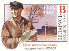 1903-1987. Нiскi Георгiй Рыгоравiч. Народны мастак РСФСР.